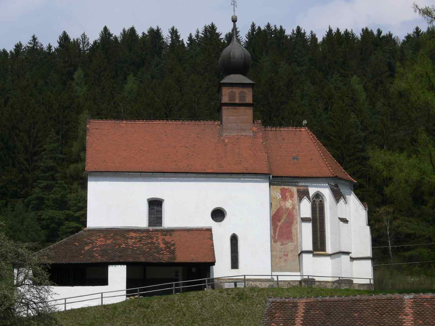 Kath. Filialkirche hl. Walpurgis in St.Michael, Obersteiermark